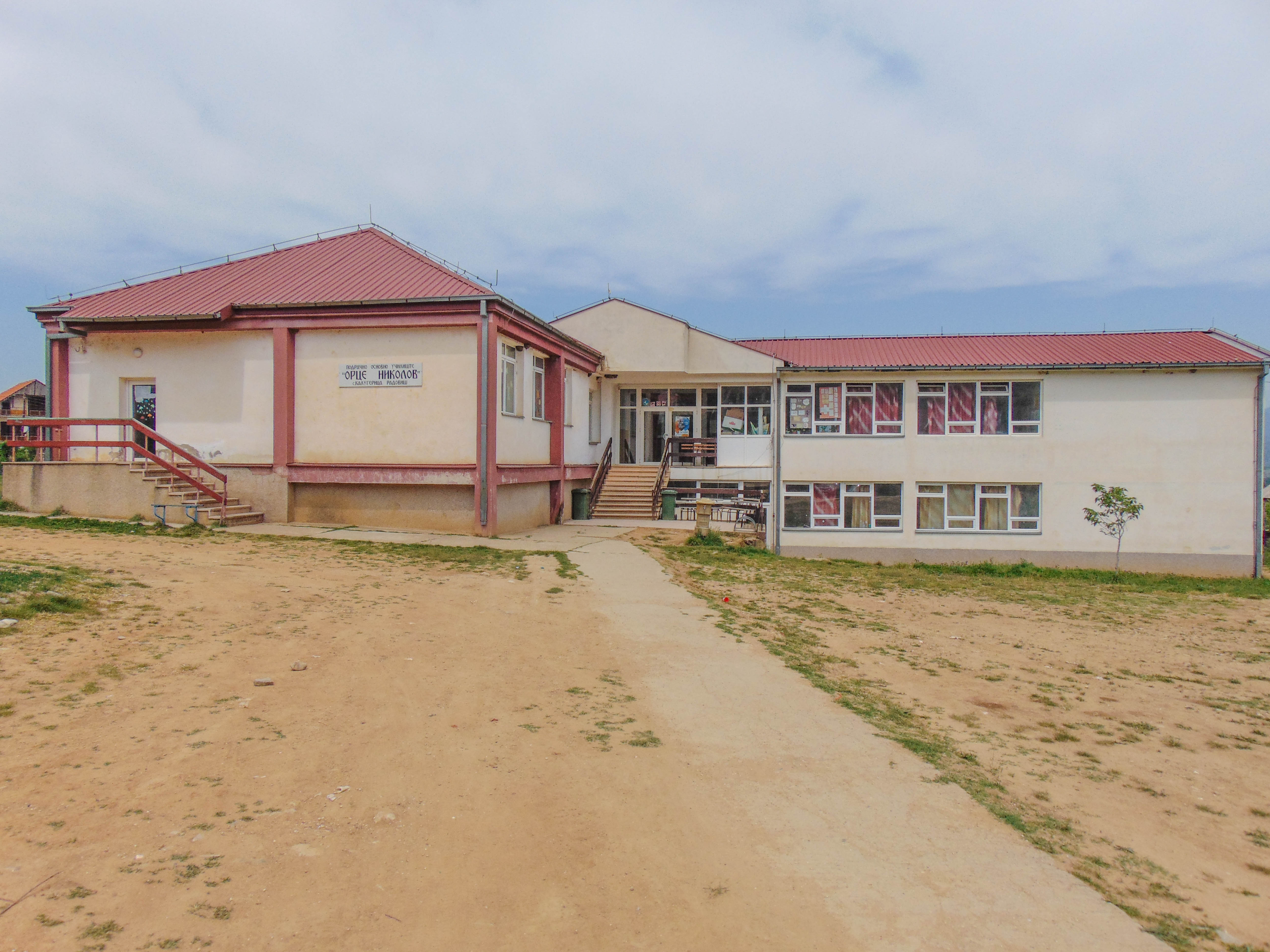 ОУ „Орце Николов“ – Калуѓерица